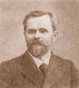 Воронцов, Василий Павлович